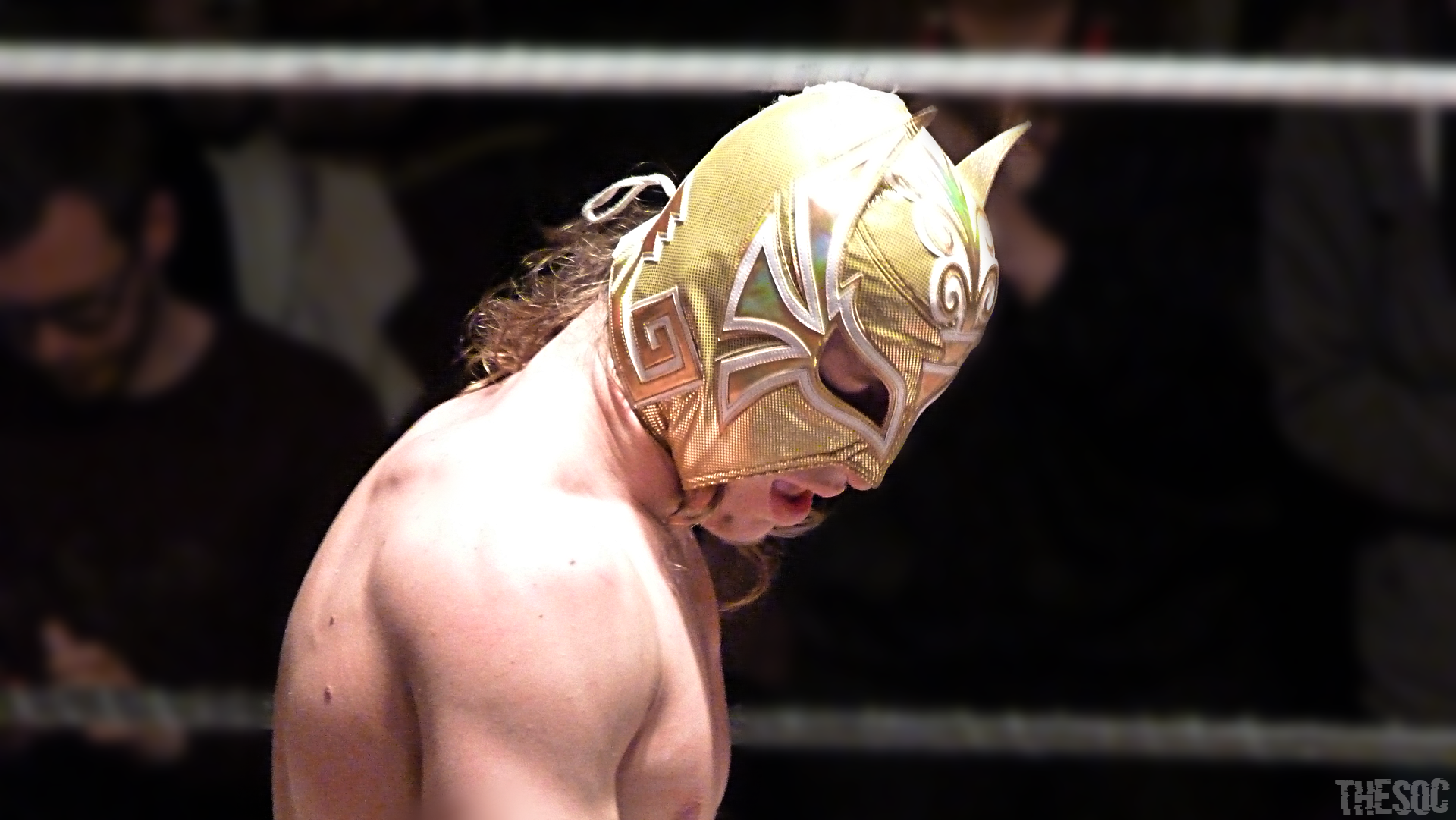 Apocalypse IV - Aigle Blanc dans le ring